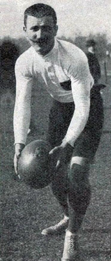 Maurice Bruneau en avril 1905.